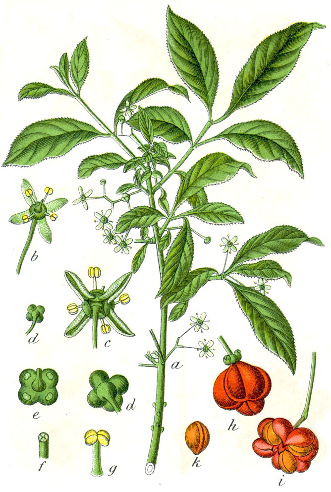 Euonymus europaeus L., syn. Euonymus europaea L. Original Caption Gemeiner Spindelbaum, Evonymus europaea